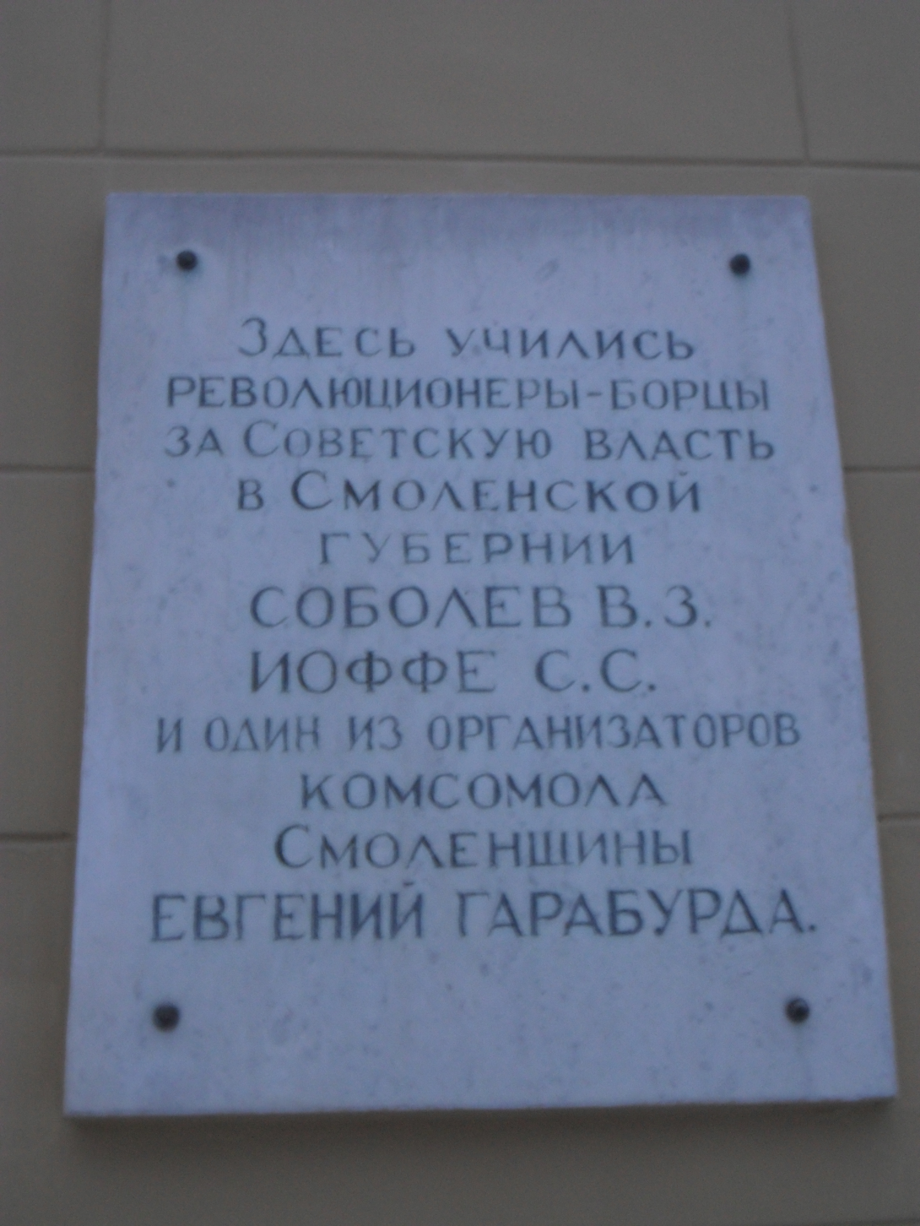 Мемориальная доска партийным деятелями Соболеву, Иоффе и Гарабурде на улице Ленина в Смоленске.